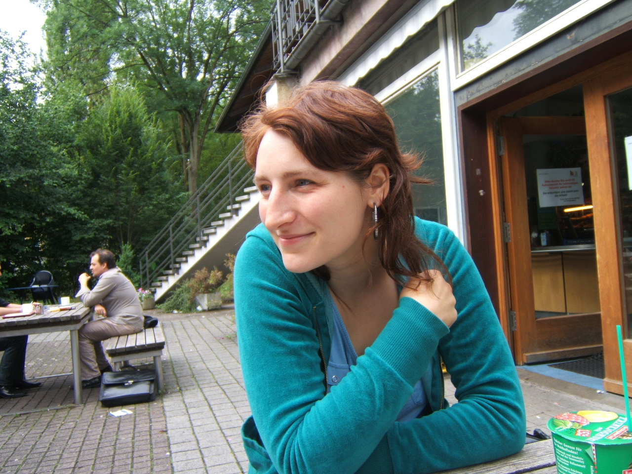 Samanta Gorzelniak